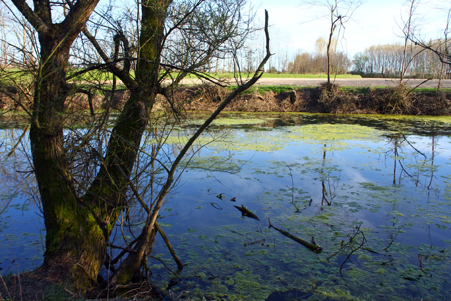 Scorcio dell'Oasi naturale "Agogna Morta" tra i comuni di Borgolavezzaro (NO) e Nicorvo (PV)